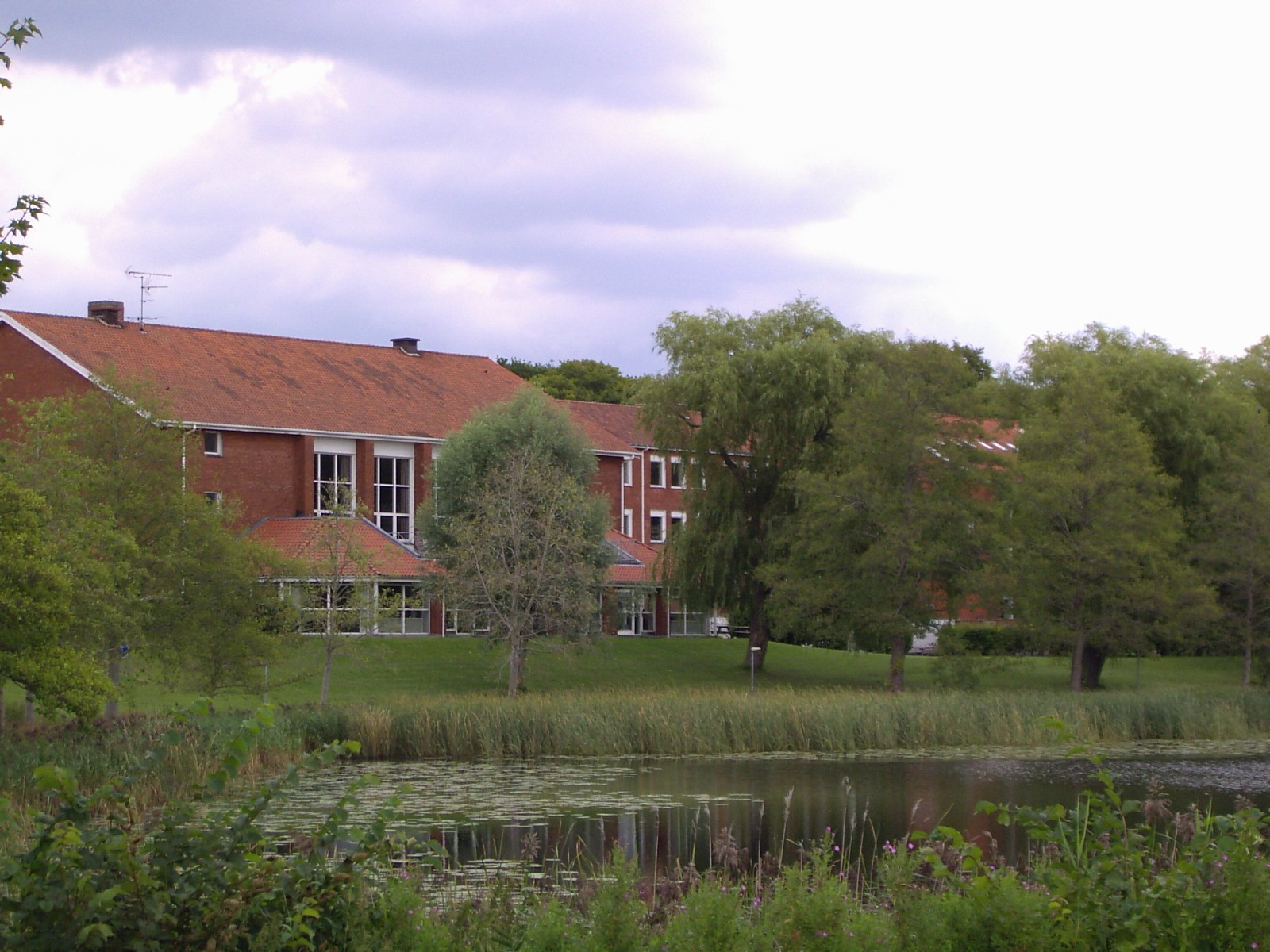 Frederiksborg Gymnasium og HF med Teglgård Sø i forgrunden